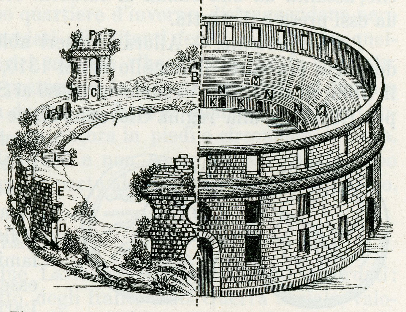 Larino: anfiteatro ricostruito secondo un disegno del 1740.